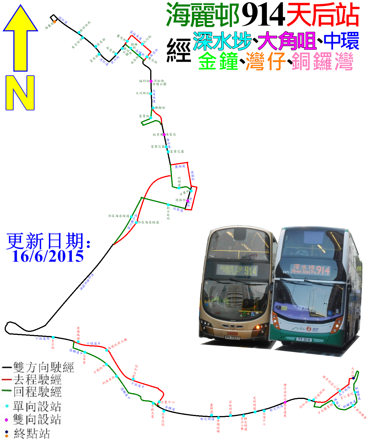 中文（香港）: 過海隧巴914線的走線圖